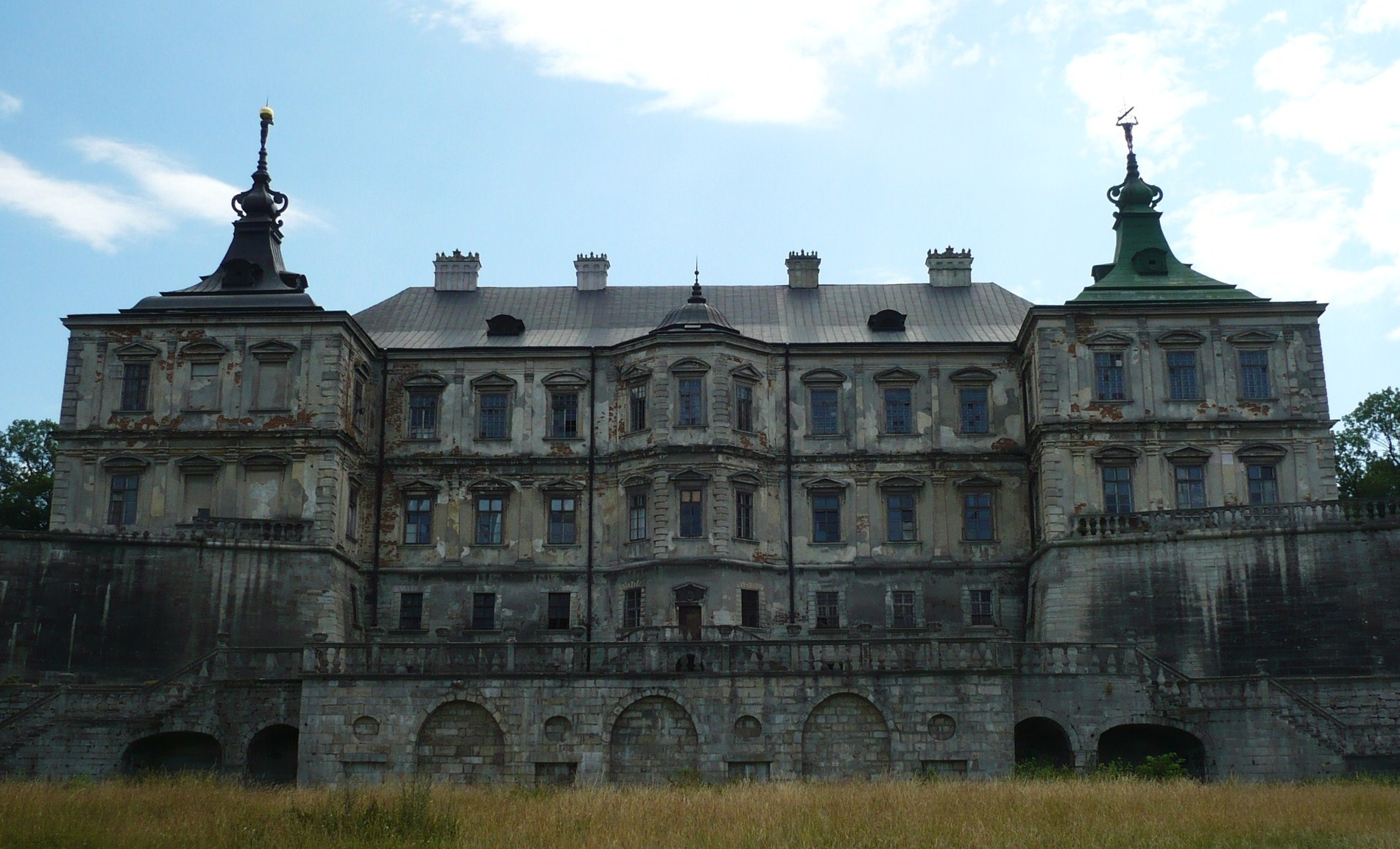 Zamek w Podhorcach